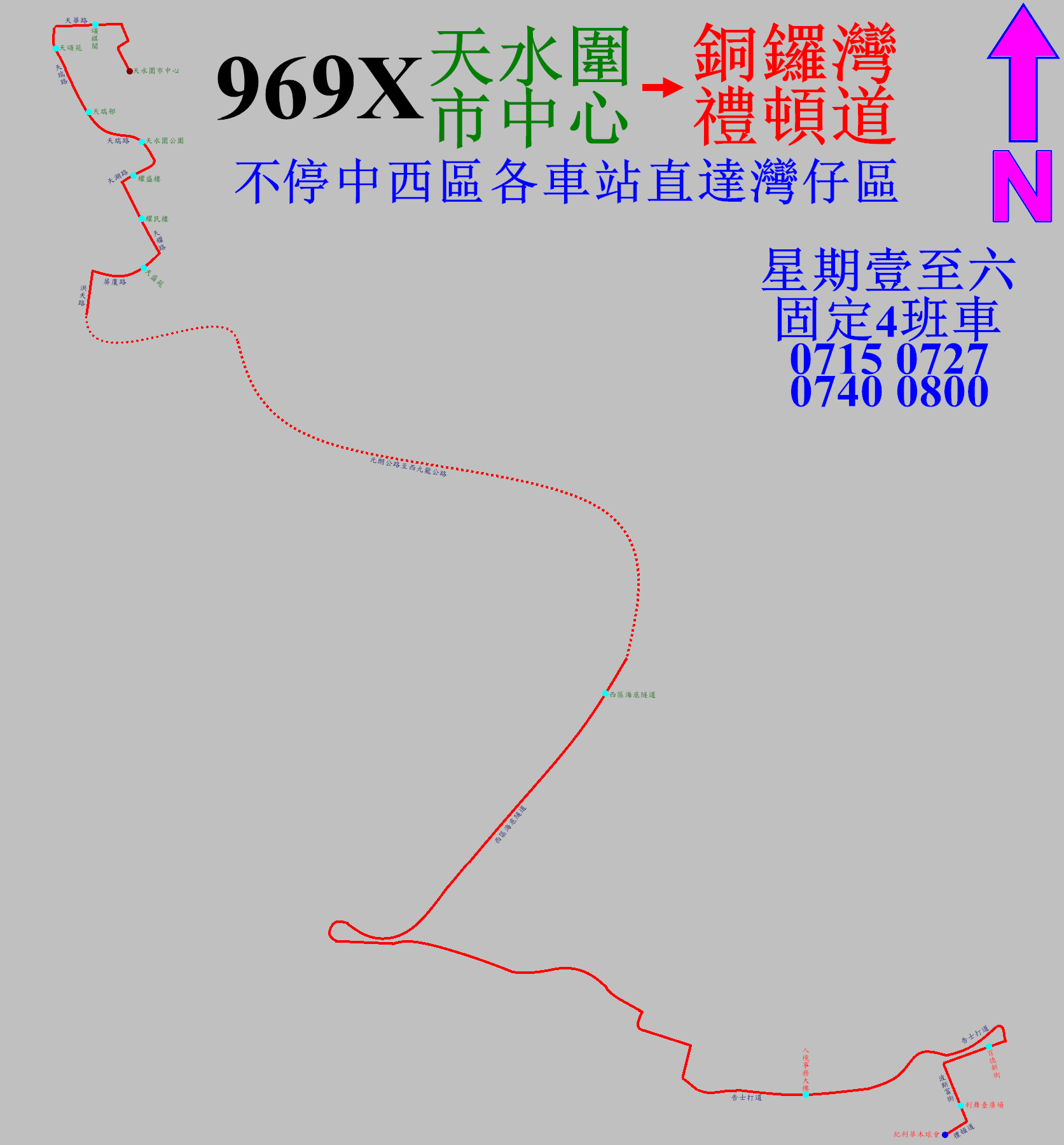 中文（香港）: 過海隧巴967X線的走線圖